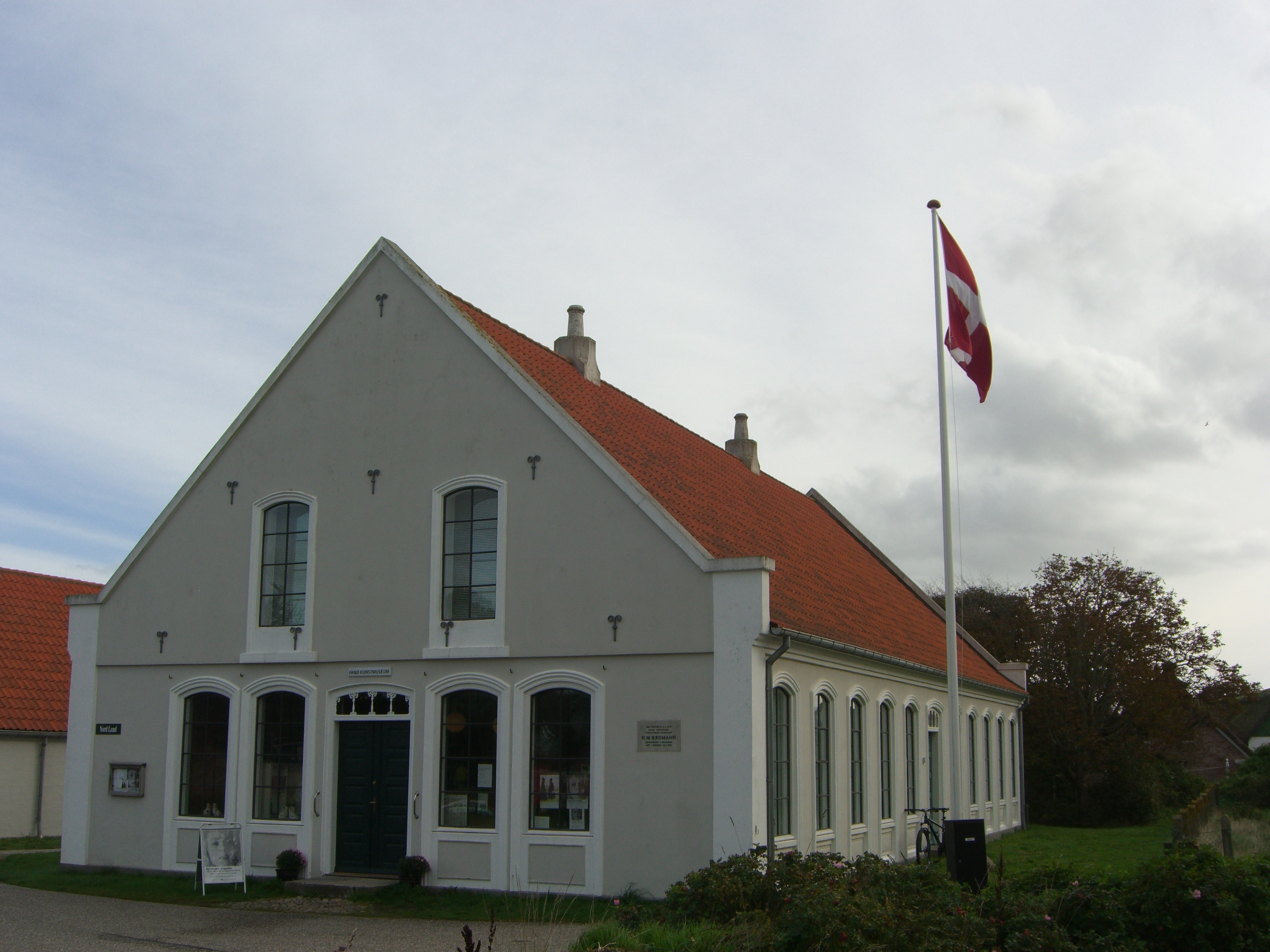 Nord Land 5, Sønderho (Fanø Kunstmuseum)